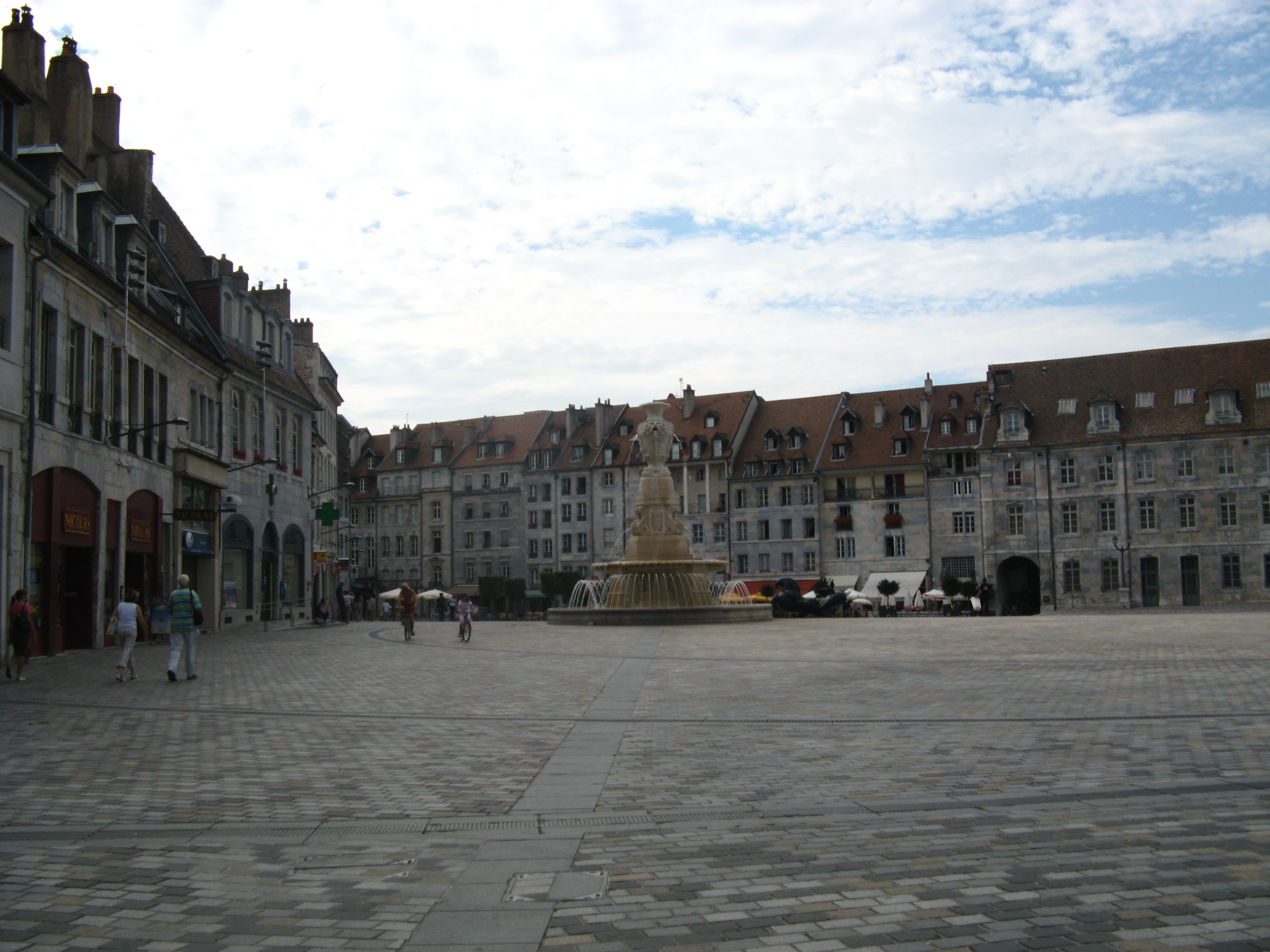 place de la révolution à Besançon